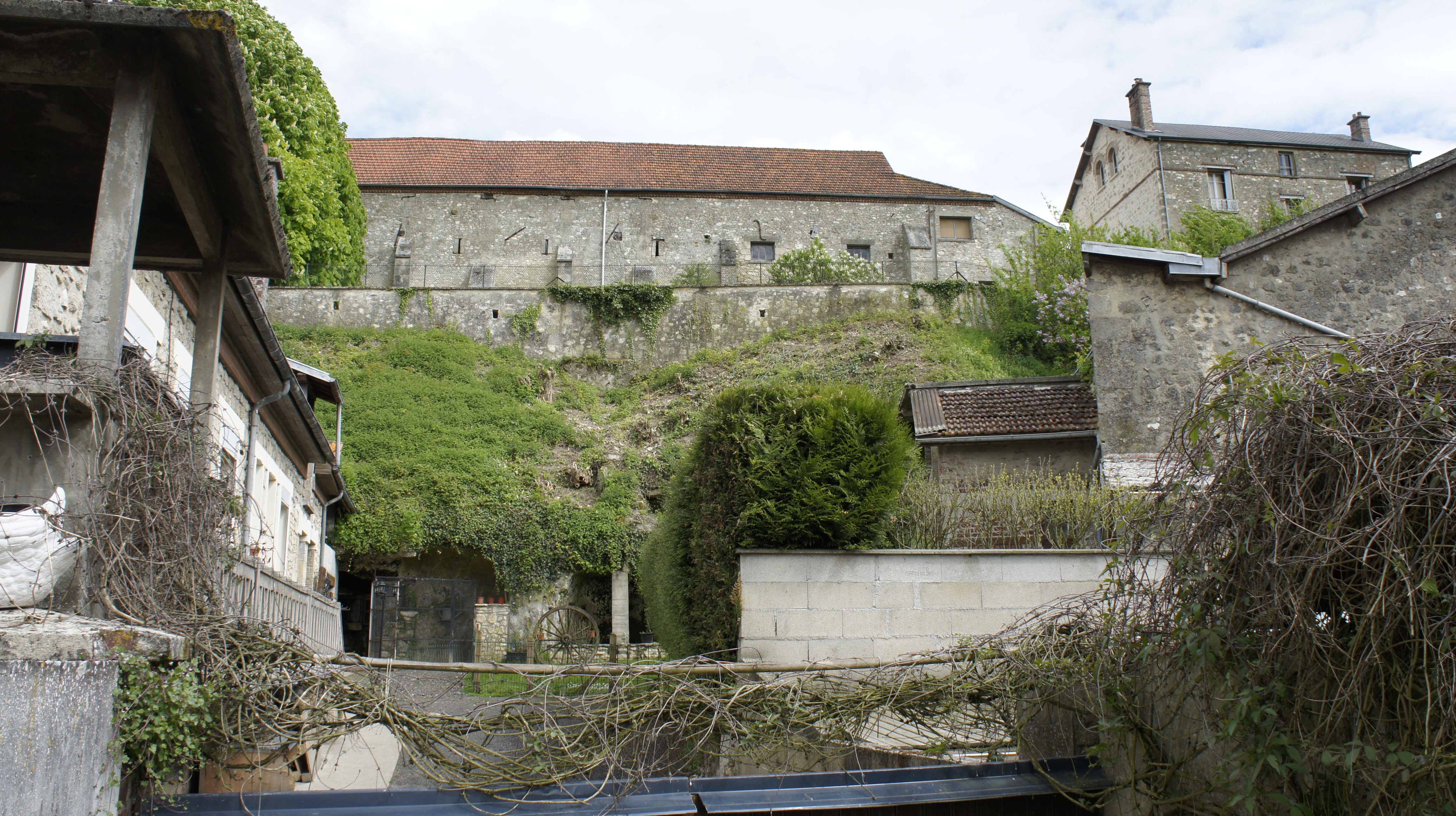 caves, le village en terrasses .